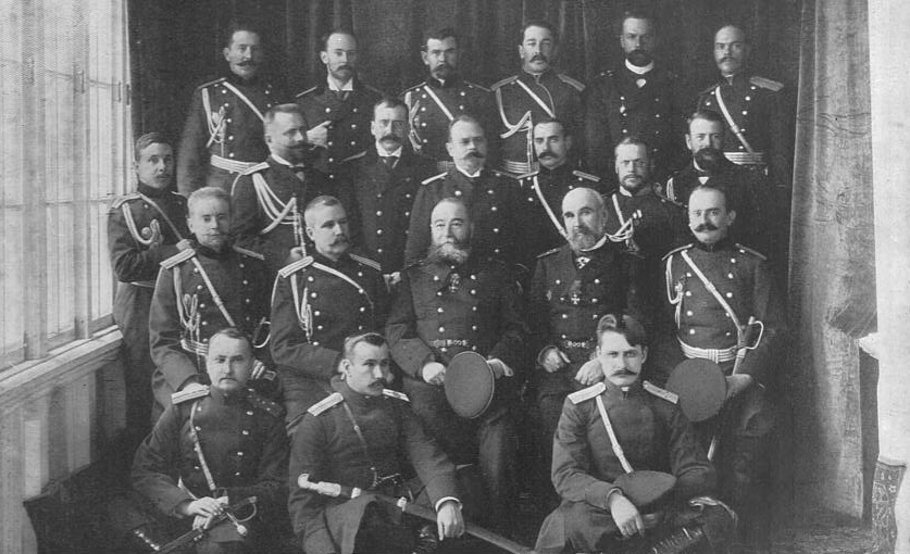 Адмирал Евгений Иванович Алексеев и его полевой штаб. Тяньцзин, 1900 г.